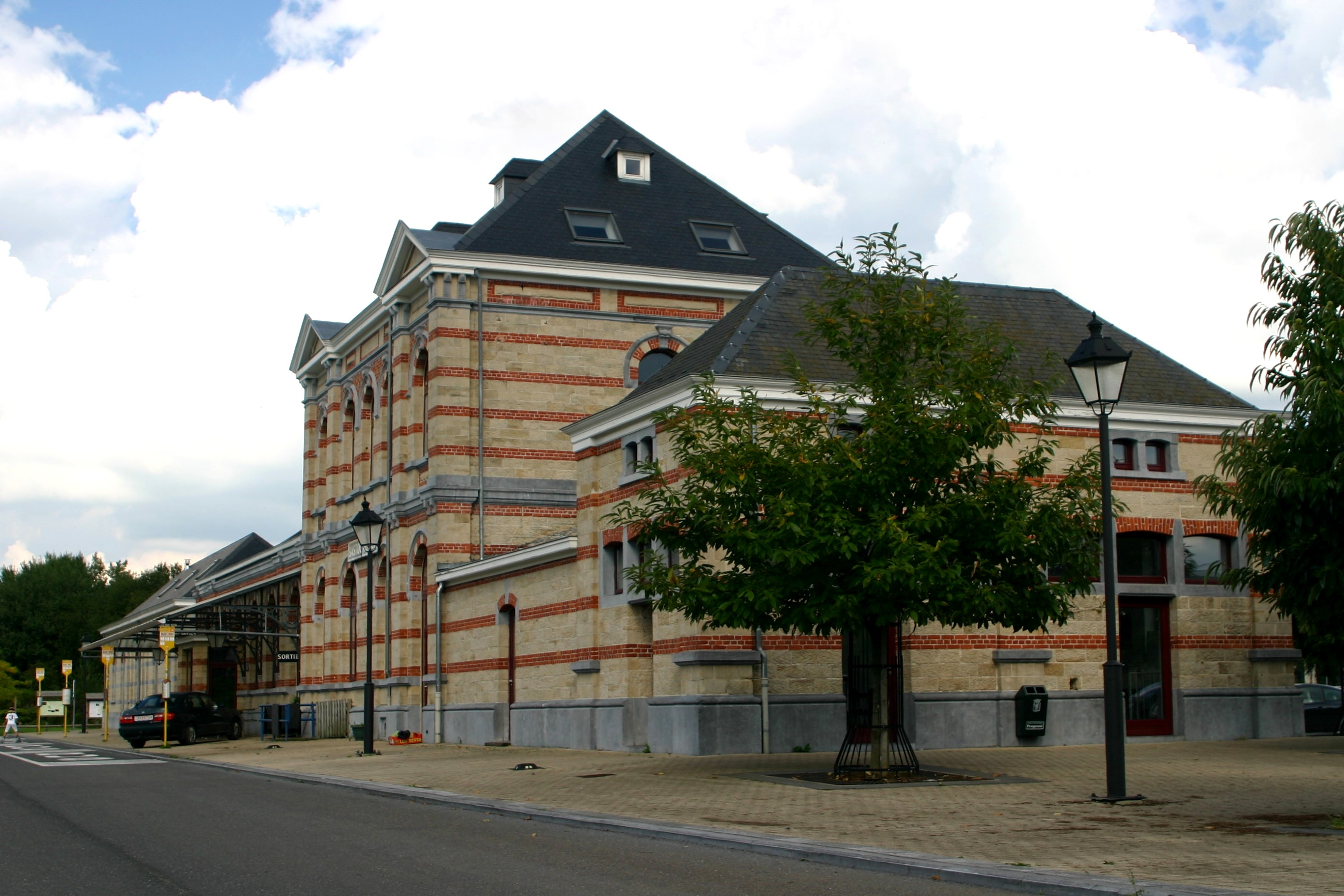 Gare Bastogne-Sud vun der Säit gesinn wou fréier d'Gleiser louchen.